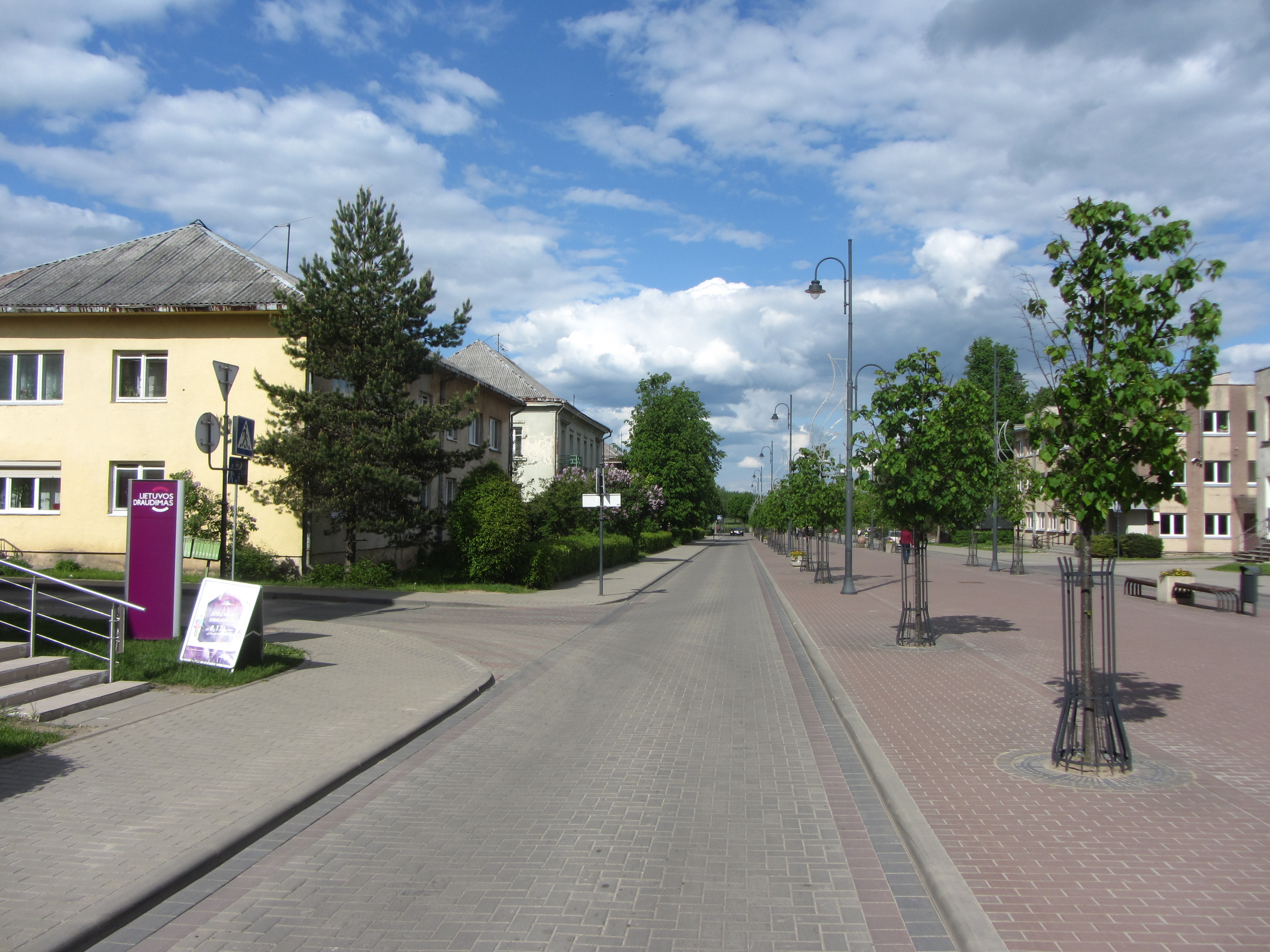 Širvintos, Lithuania